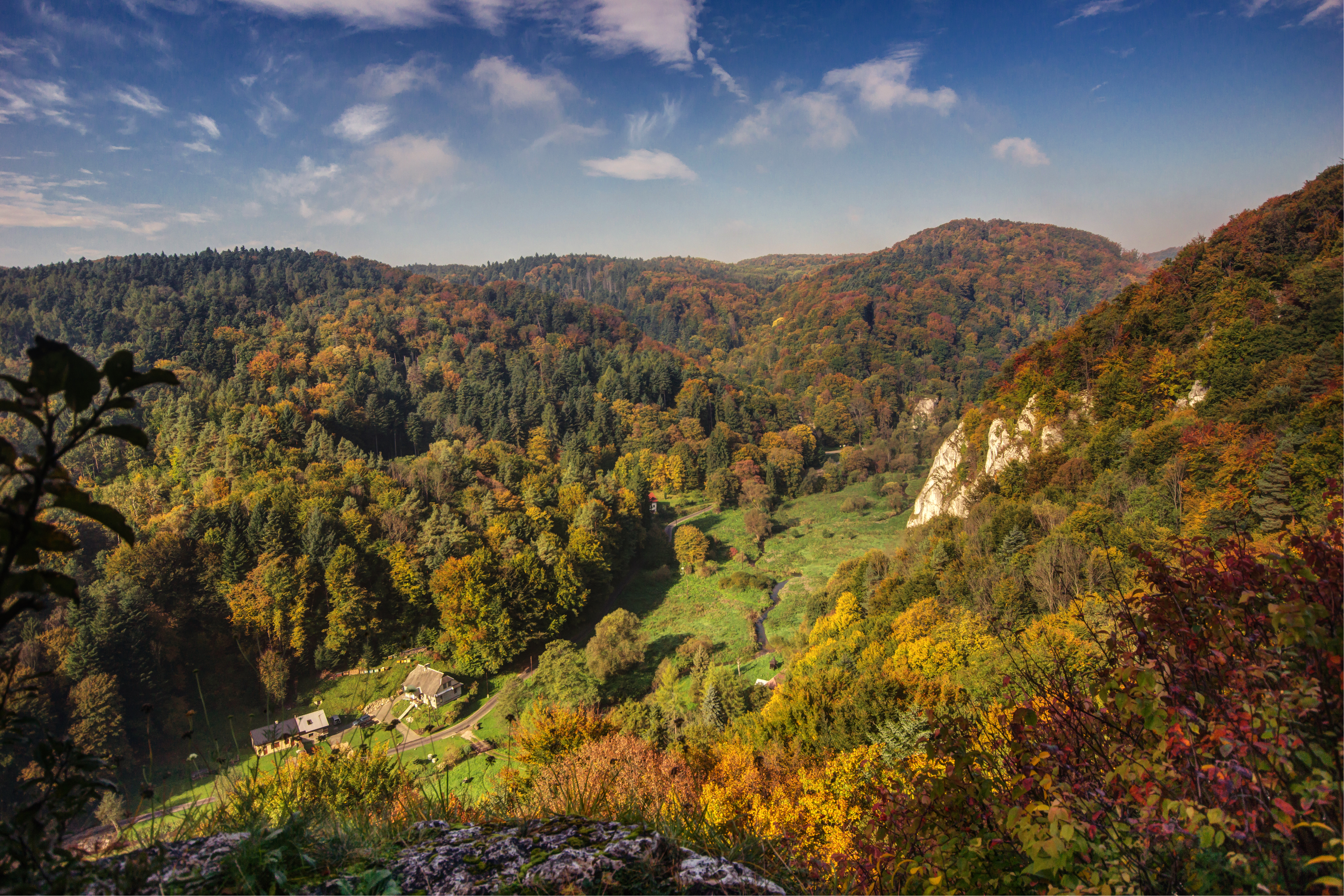 Specjalny obszar ochrony siedlisk Dolina Prądnika. This is a photography of Natura 2000 protected area with ID PLH120004